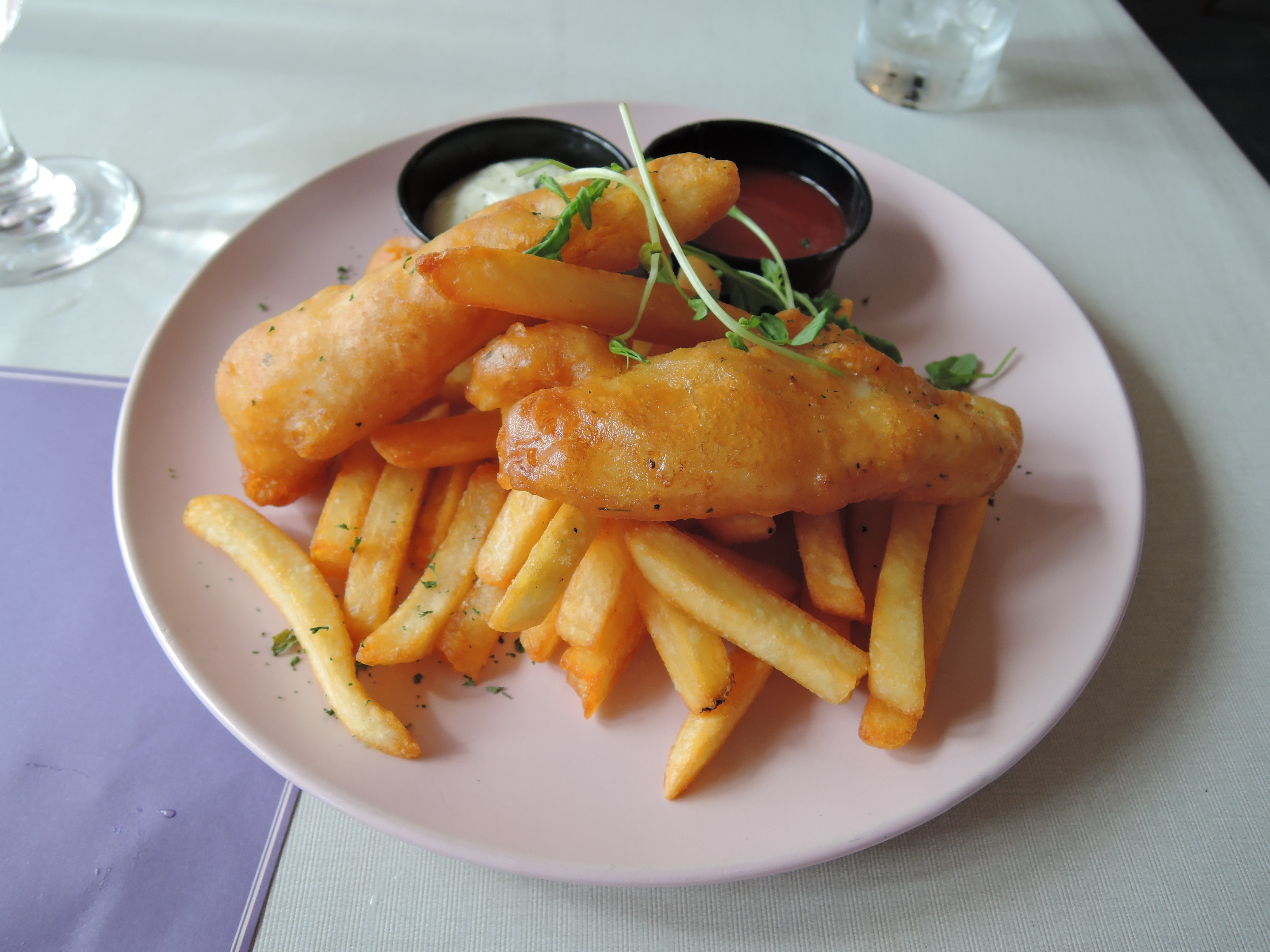 fired Fish and fries in Savoir Cafe western restaurant at Yuen Long